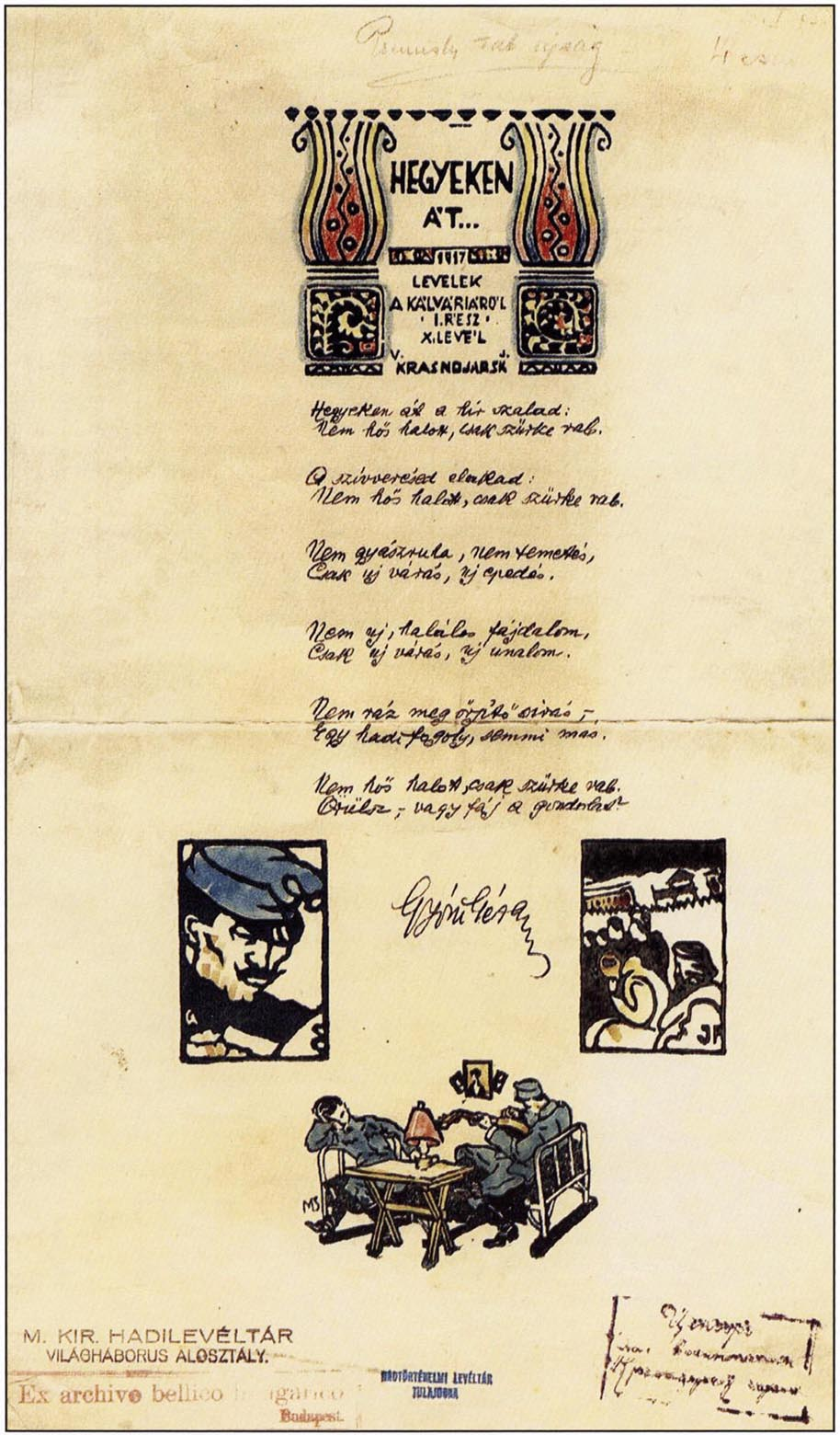 A krasznojarszki hadifogolytáborban készített emléklap, amelyre Gyóni Géza sajátkezüleg írta versét.